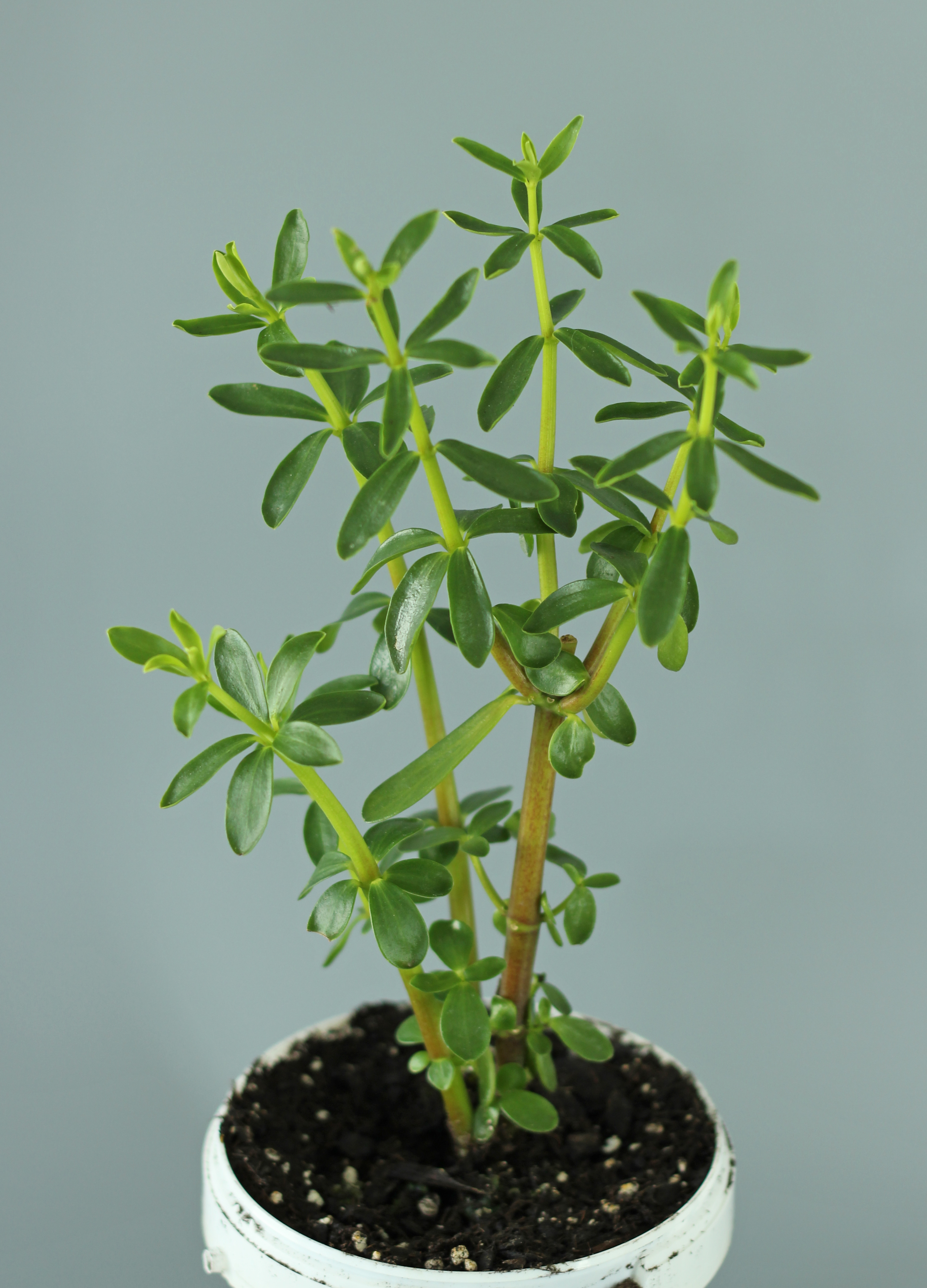 Bildinhalt: Zimtpfeffer (Peperomia inaequalifolia) im Blumentopf Aufnahmeort: Frankfurt am Main, Deutschland